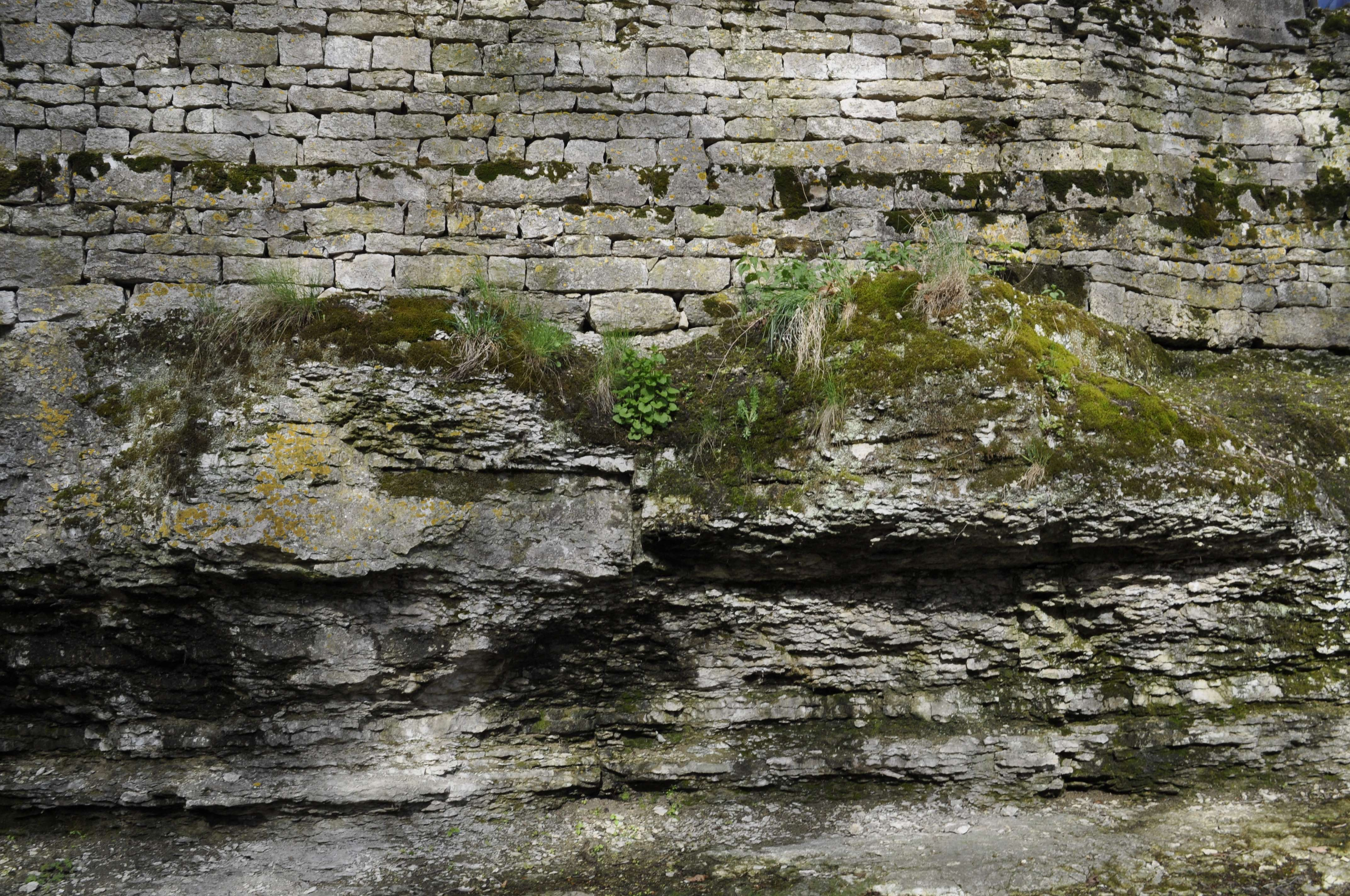 Source de la Bèze à Bèze (Côte d'Or) : roches.